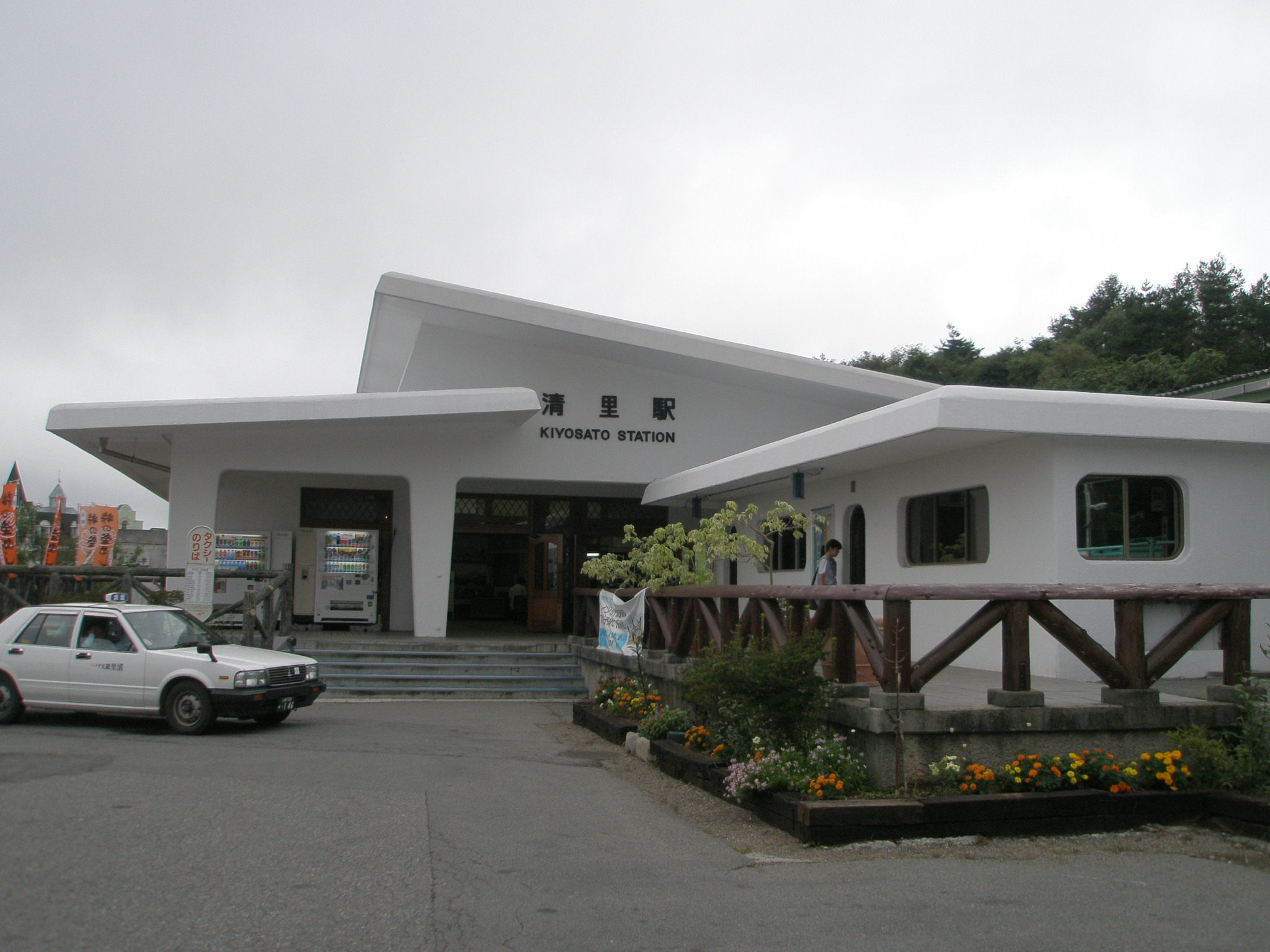 清里駅駅舎（2009年実施の駅前改修事業が行なわれる前）